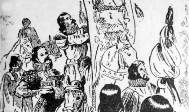 La Audiencia y Cancillería Real de Chile fue el más alto tribunal de la Corona española en el Reino de Chile. Fue creada en 1565 e instalada en la ciudad de Concepción hasta que fue disuelta en 1575. En 1609 fue restablecida e instalada en la ciudad de Santiago, siendo, disuelta en 1811, tras el motín de Figueroa. Reinstalada en 1814, a consecuencia de la reconquista española, finalmente, fue abolida de forma definitiva en 1818.